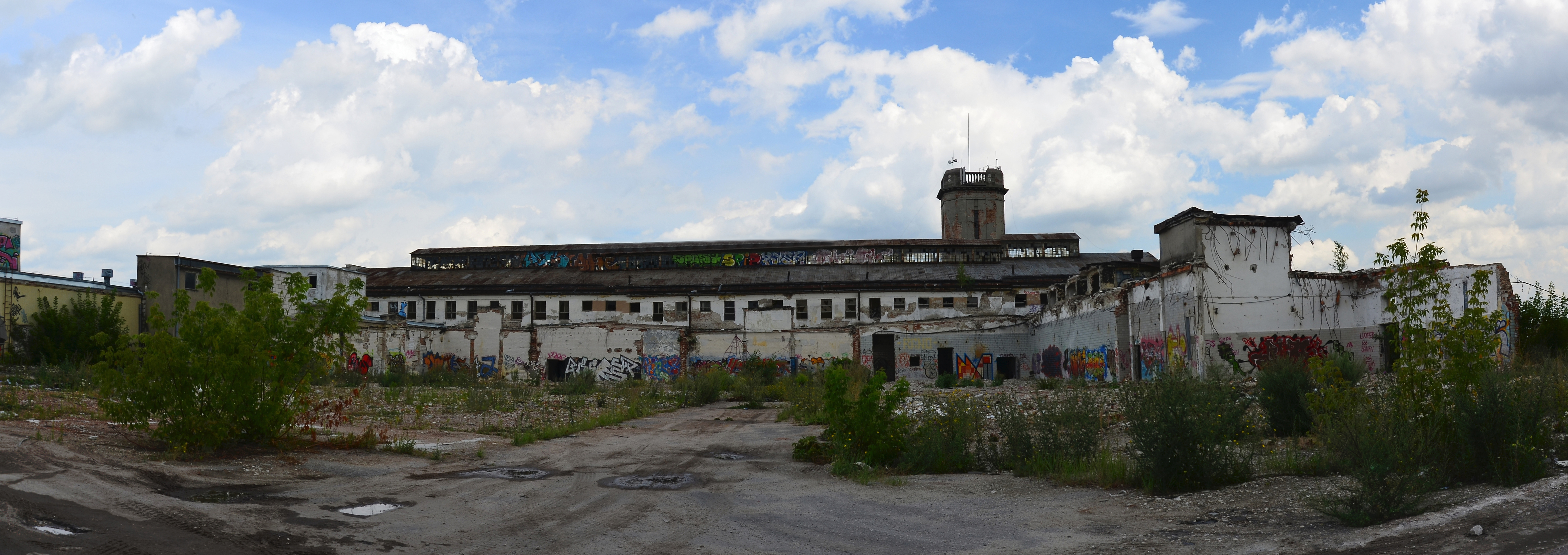 panorama terenu Zakładów Mięsnych "Lubmeat" w Lublinie, zdewastowanych i zrujnowanych